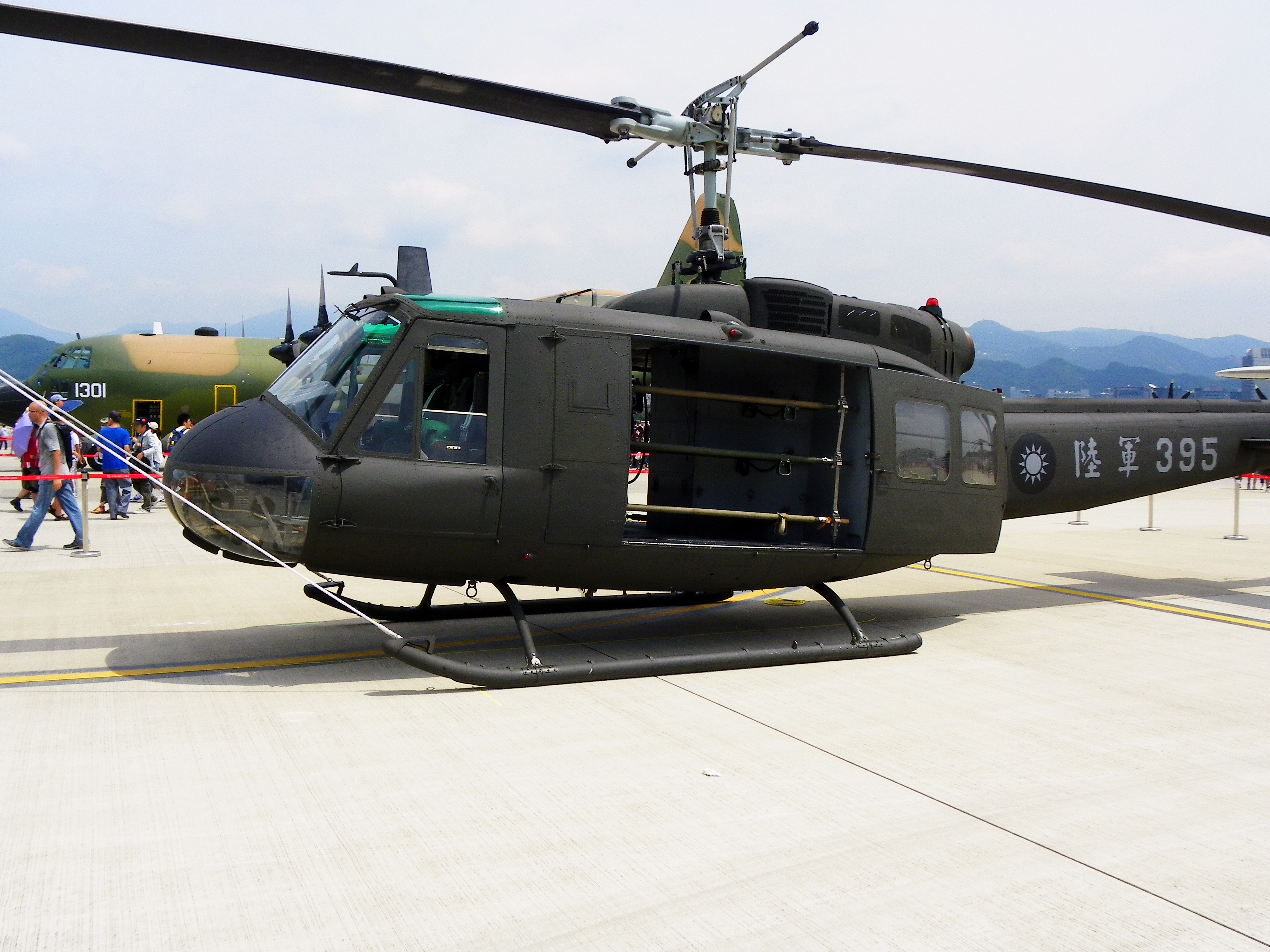 中文（台灣）: 陸軍UH-1H直昇機機艙側視，攝於2011年8月13日空軍松山基地營區開放活動。